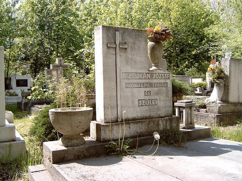 Pelikán József (Budapest, 1913. október 1. – Budapest, 1969. május 16.) építészmérnök, egyetemi tanár sírja Budapesten. Új köztemető: 21-1-47/48